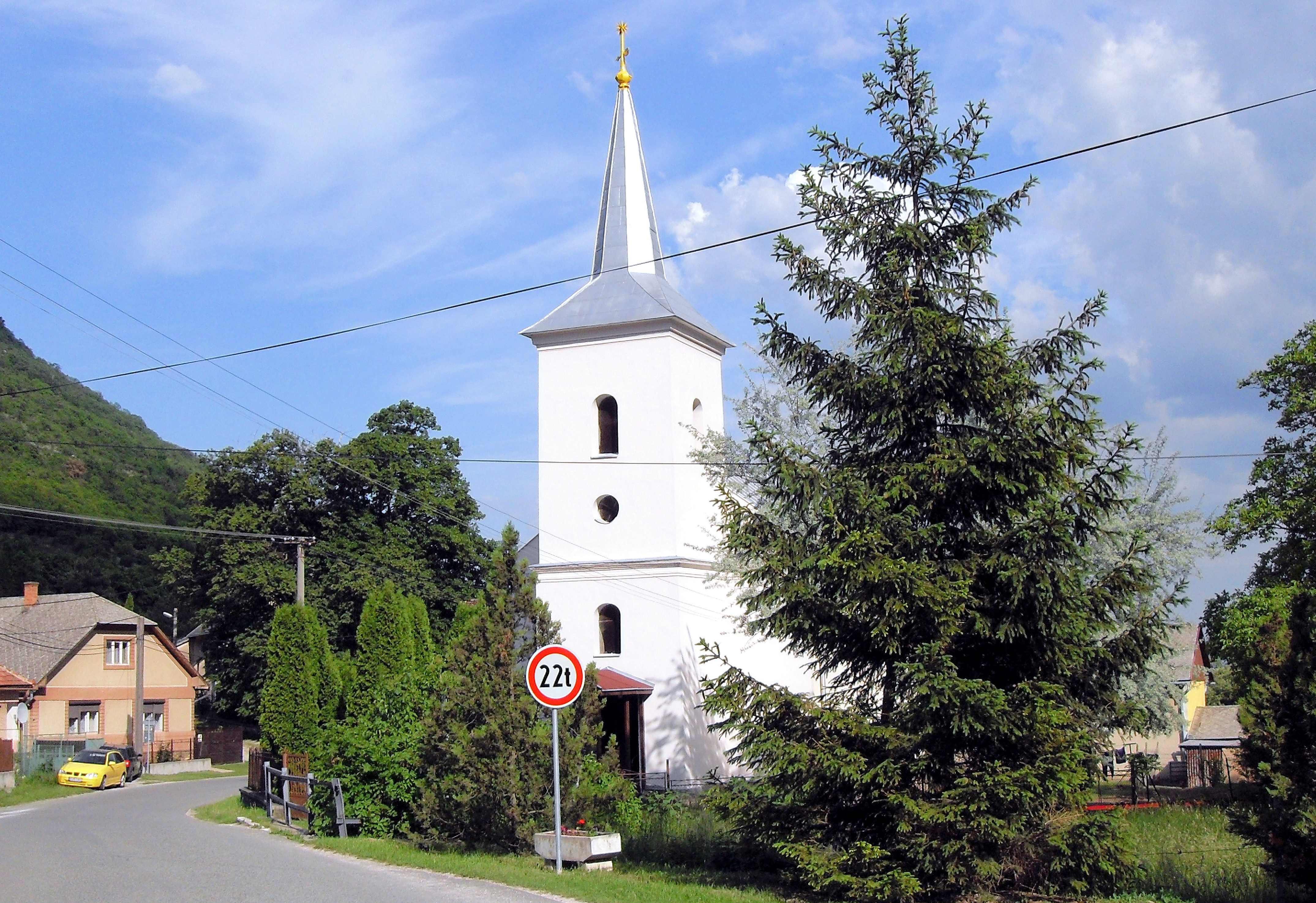 Haj, Reformovaný kostol